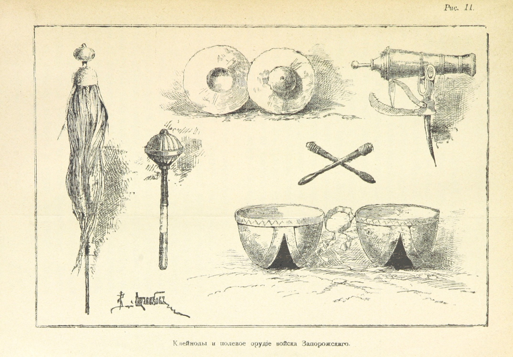 Козацькі клейноди. "Исторія государства россійскаго ... Ежемѣсячное приложеніе къ журналу “Сѣверъ” ... Печатано подъ наблюденіемъ проф. П. Н. Полевого. [With plates and genealogical tables.] том 7-12"